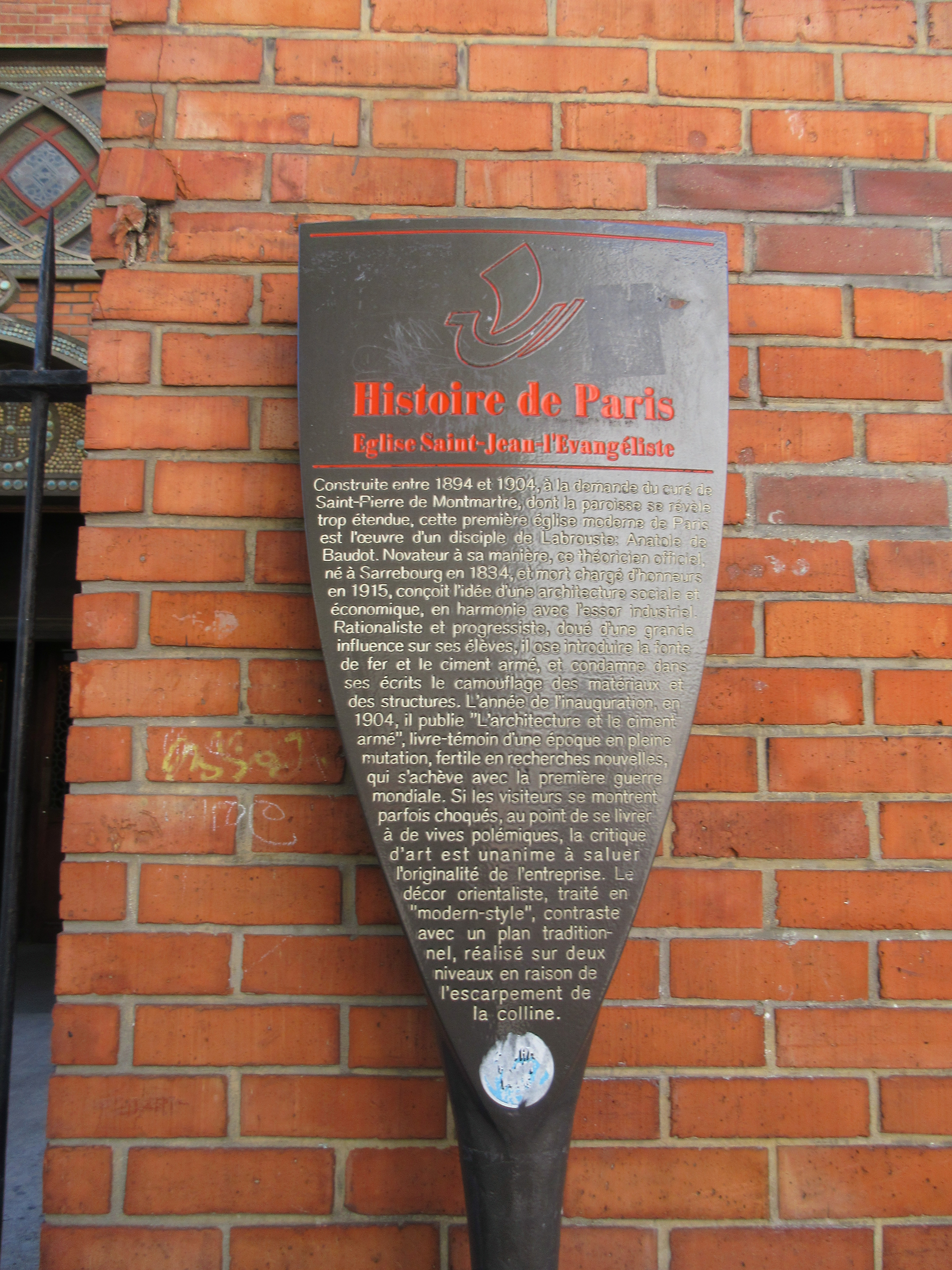 Panneau Histoire de Paris